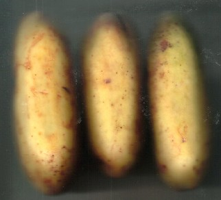 Frutos de Passiflora tripartita